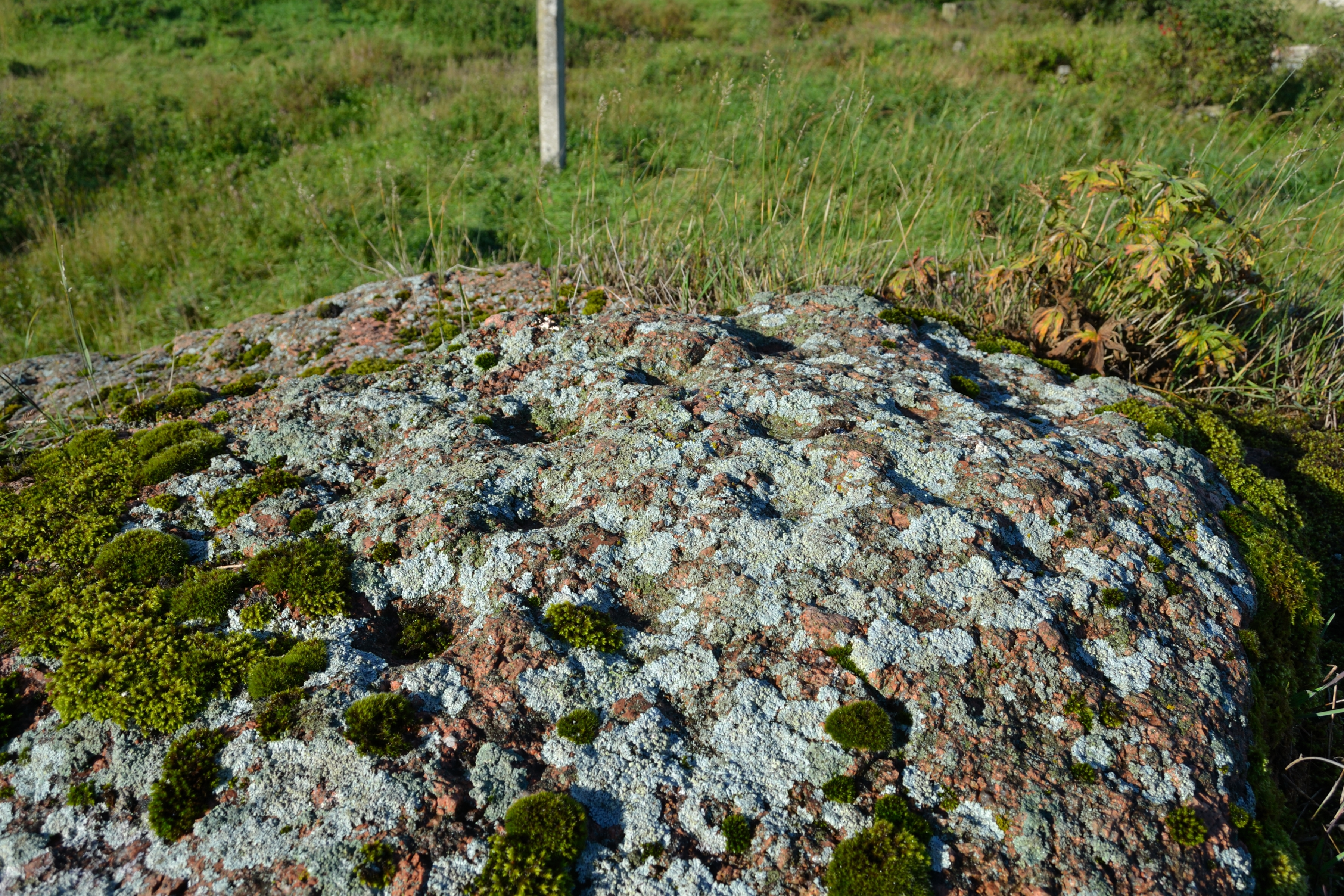 Kultusekivi, Saue vald, Kiia küla